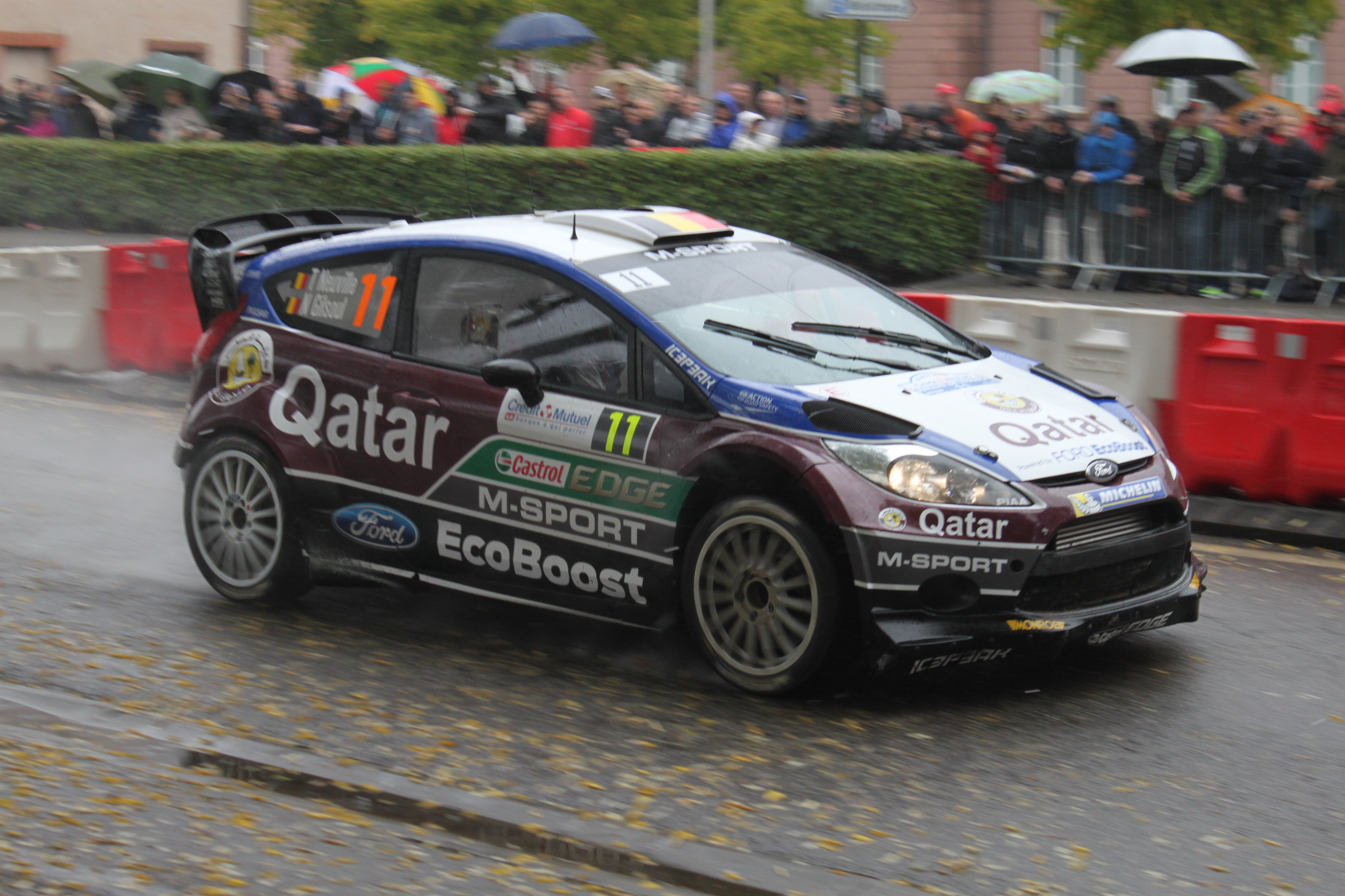 Thierry Neuville Rallye de France-Alsace 2013